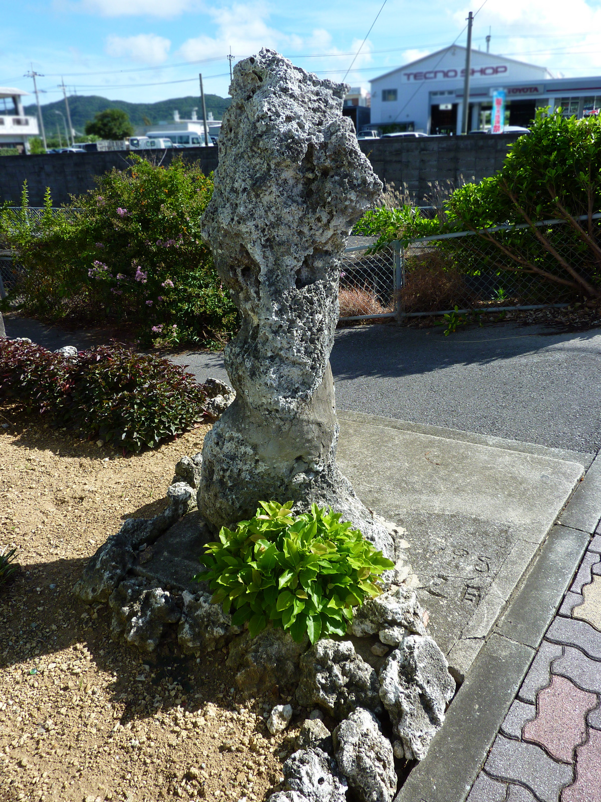 星見石（沖縄県石垣市登野城）